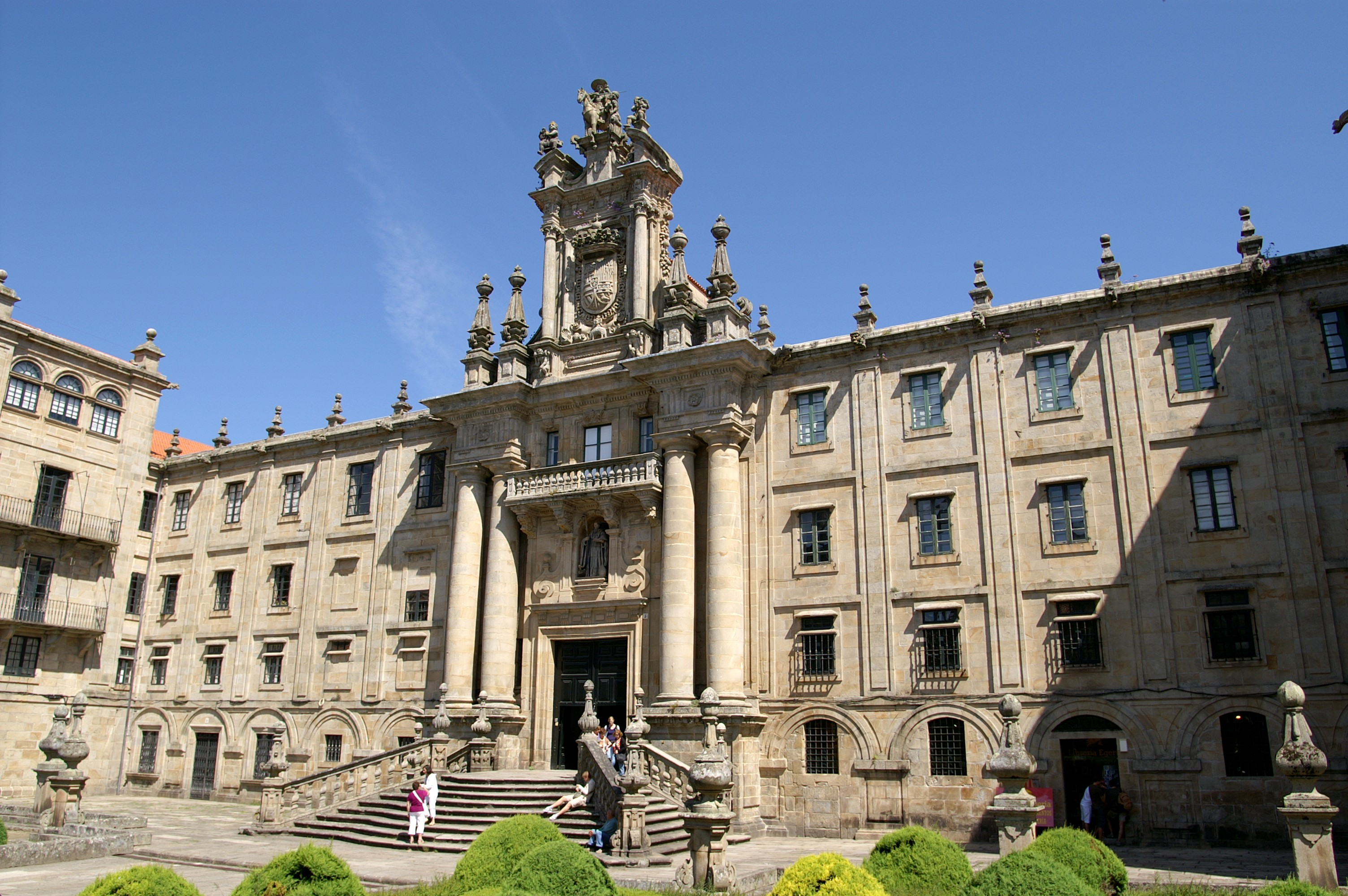 Abtei San Martín Pinario